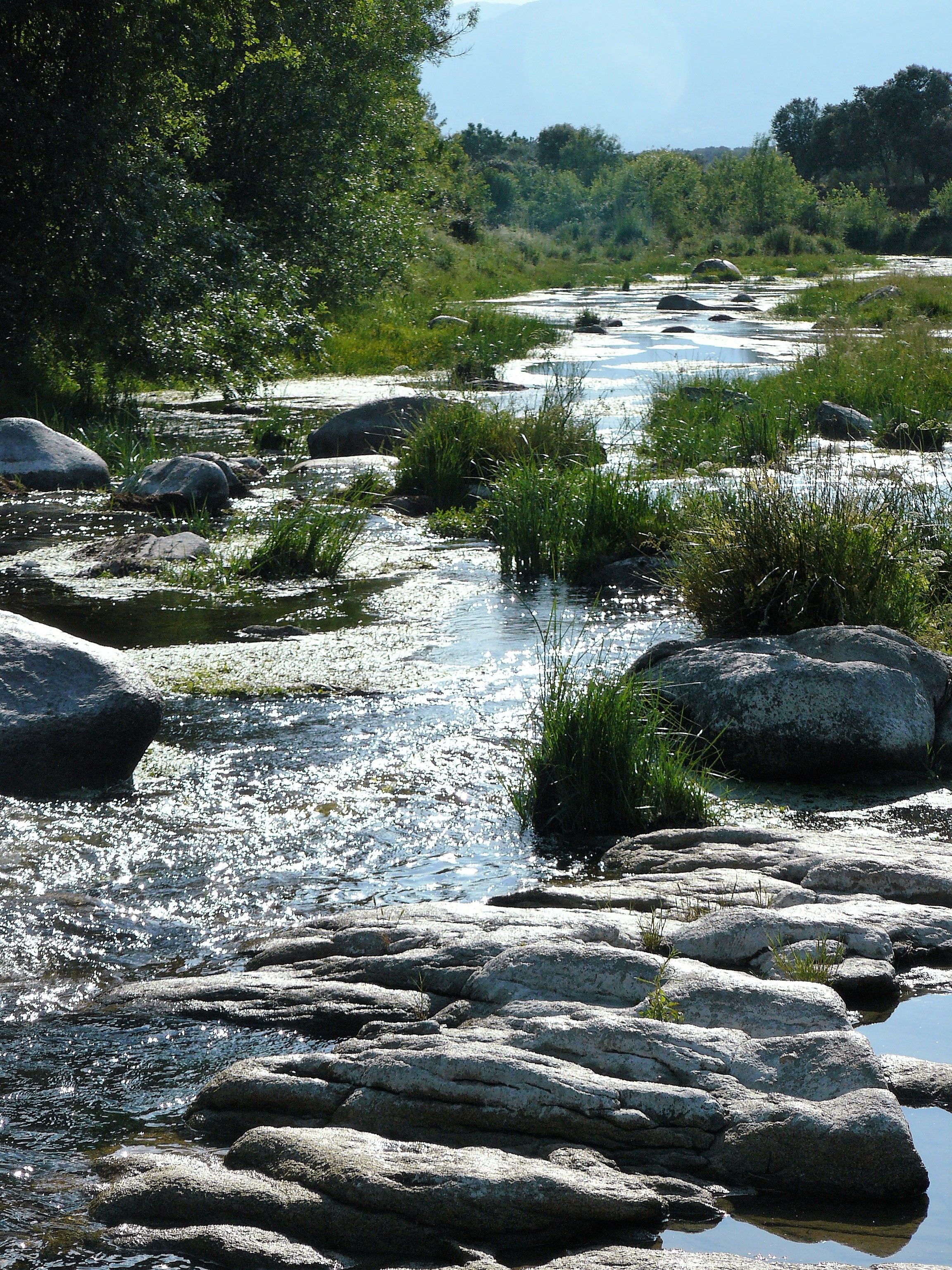 Sierra de San Vicente y valles del Tiétar y Alberche This is a photography of a Site of Community Importance in Spain with the ID: ES4250001. Natura2000 entry, EEA entry